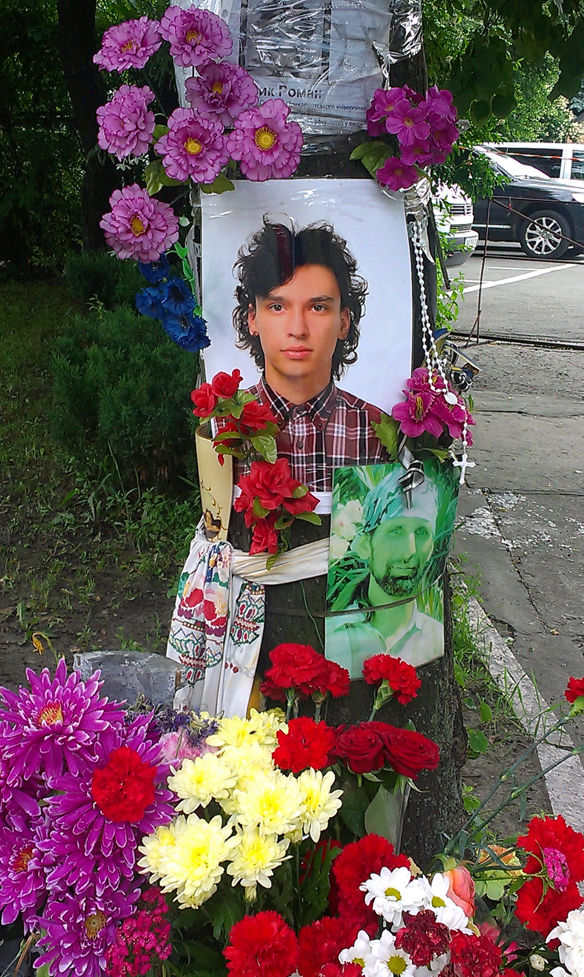 Ukraine Majdan 2014